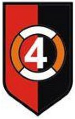 WZÓR GRAFICZNY OZNAKI ROZPOZNAWCZEJ 4. BATALIONU INŻYNIERYJNEGO NA MUNDUR WYJŚCIOWY